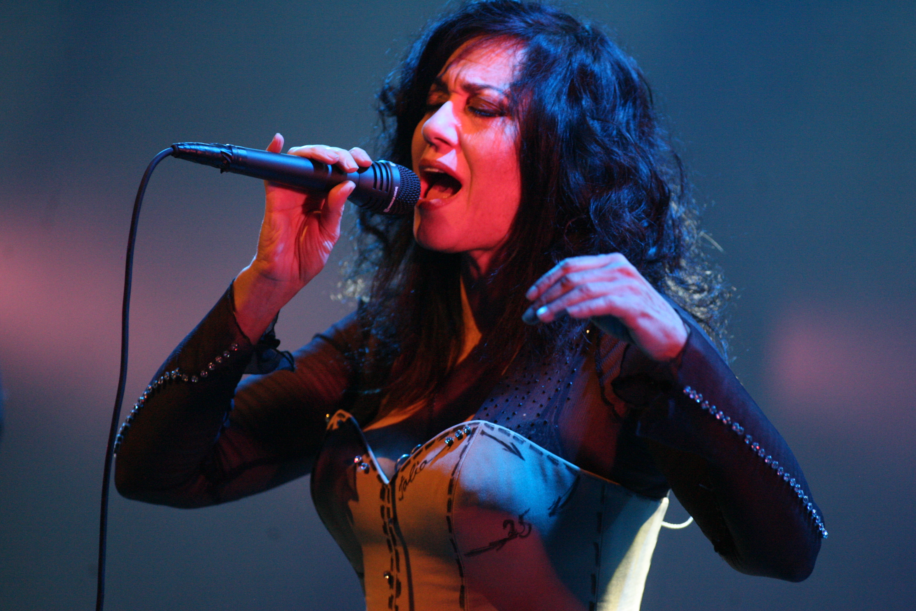 שלומית אהרון בהופעה חיה